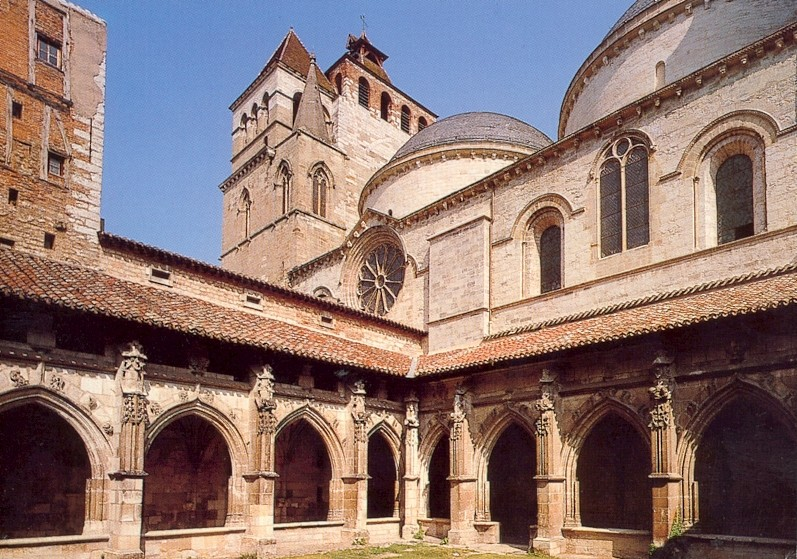 Cloître de Cahors (Lot, Midi-Pyrénées, France).